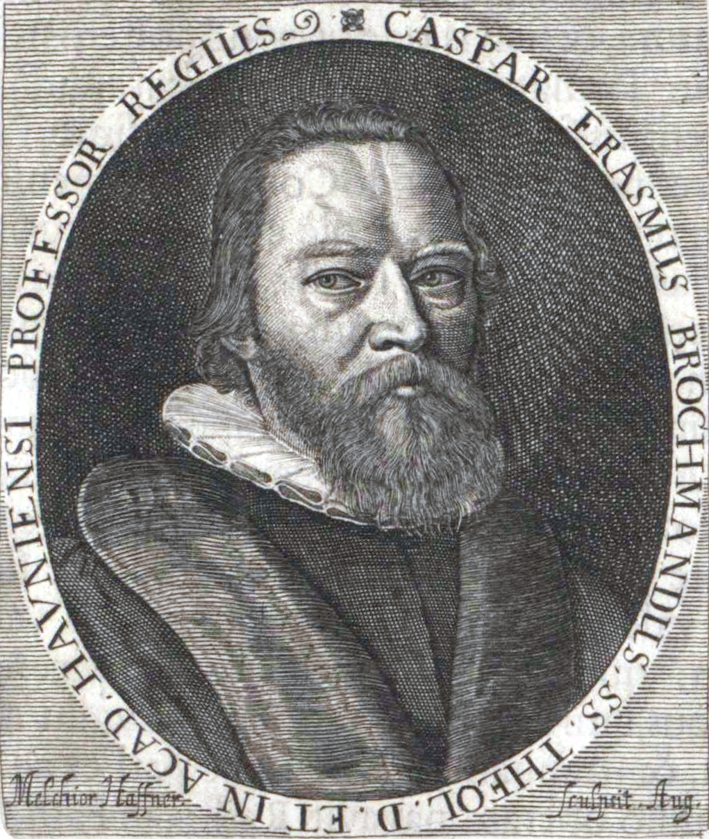 Jesper Rasmussen Brochmand (1585–1652), dänischer lutherischer Theologe. Kupferstich